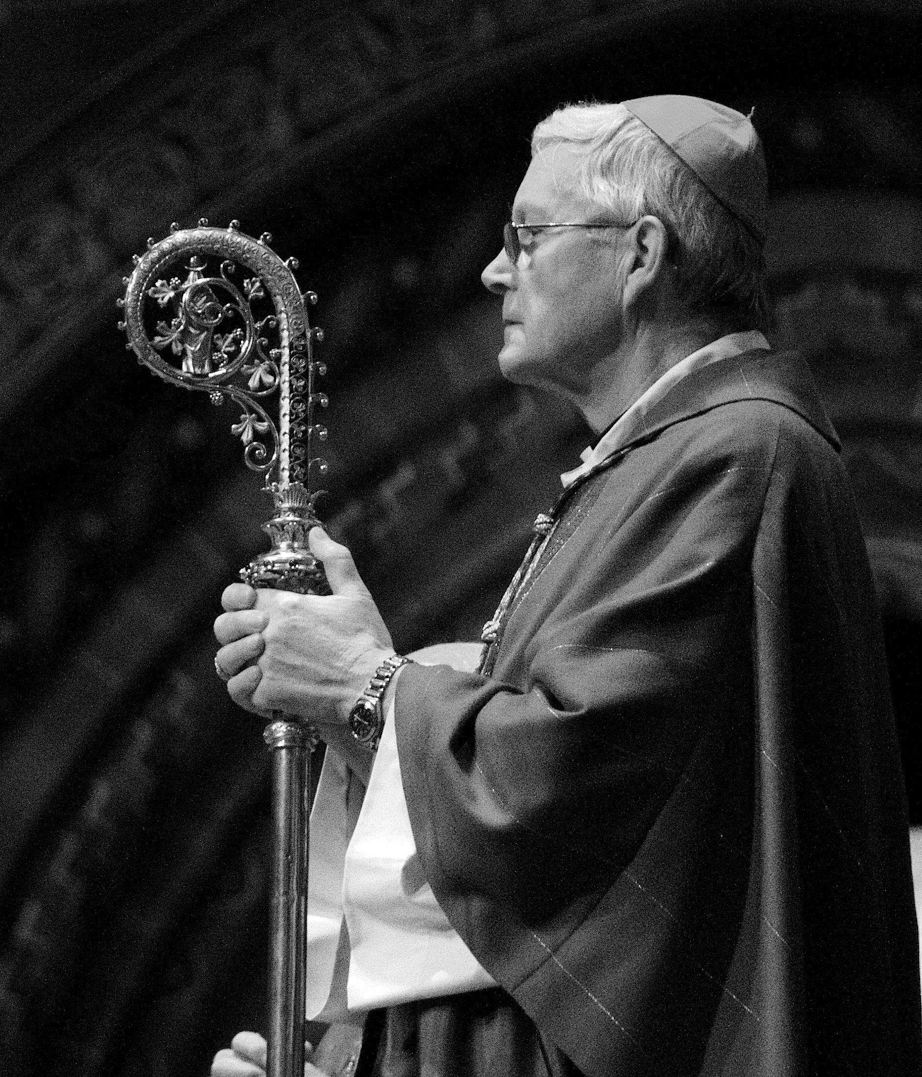 Mgr Jean-Pierre Grallet par Claude Truong-Ngoc mai 2013